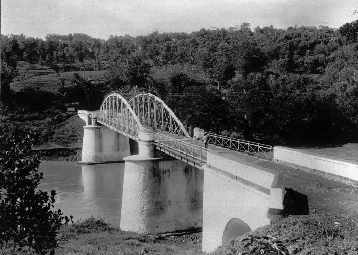 Foto. Viaduct bij Batoejadjar, West-Java.